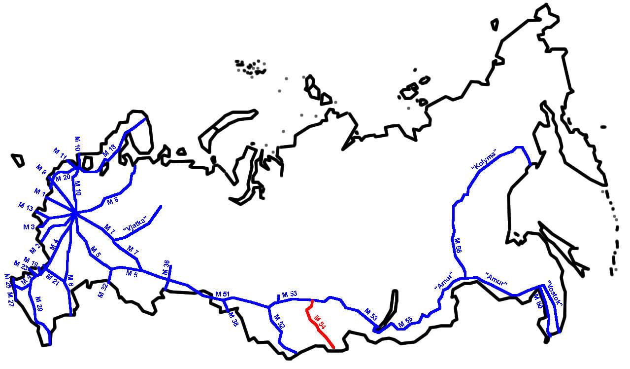 M54 im russischen Fernstraßennetz